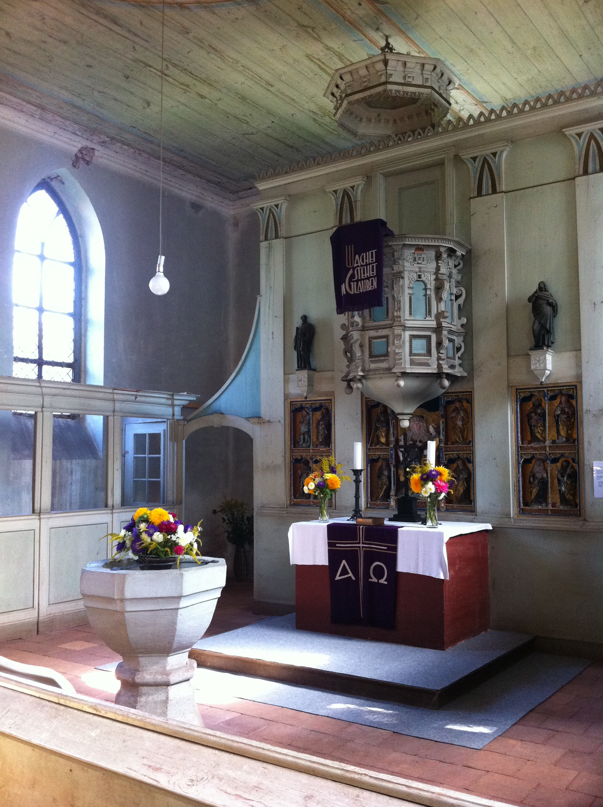 Dorfkirche Kleinwusterwitz - Innenansicht Altarraum